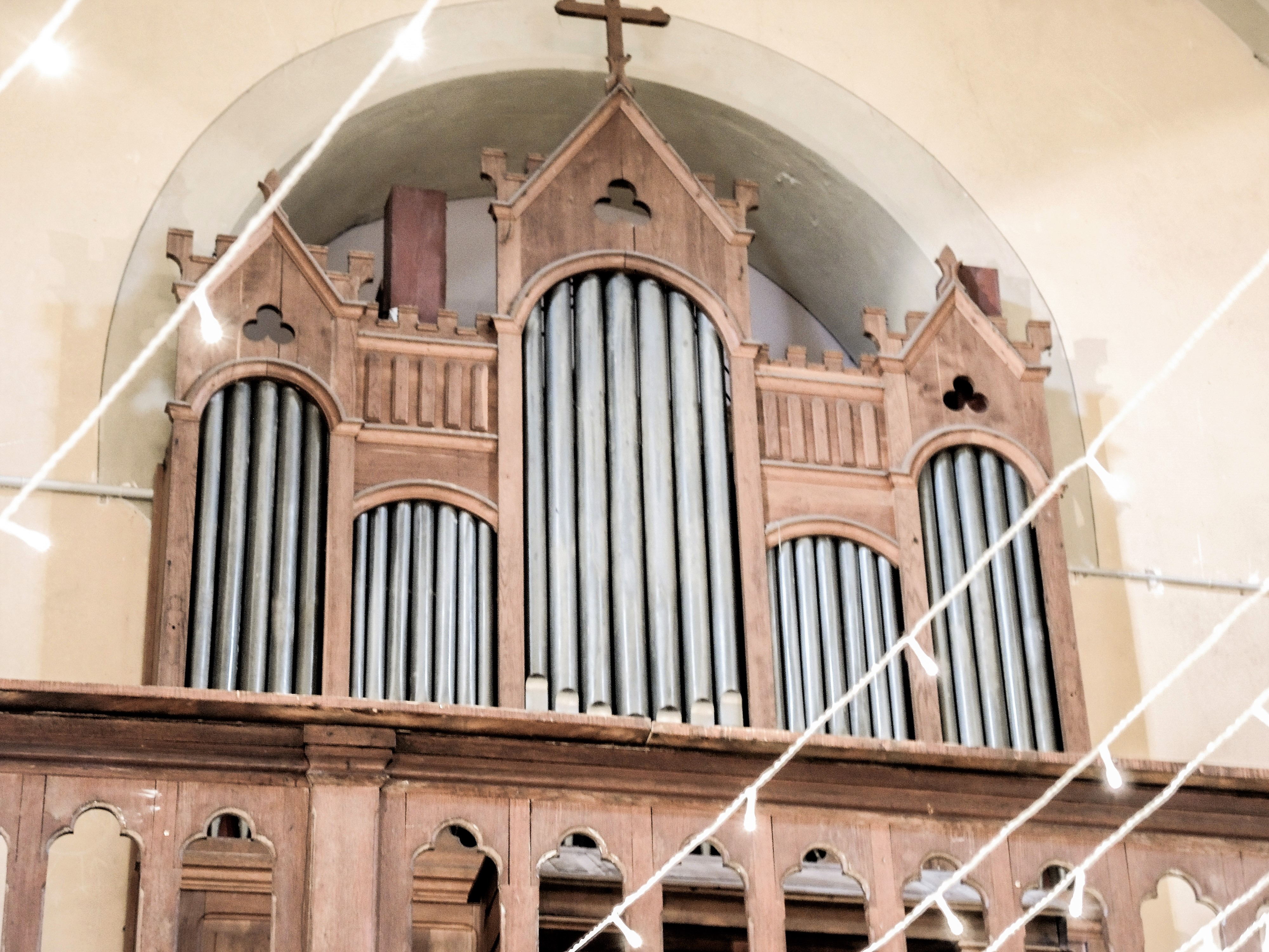 Orgue de 1925, de Joseph Voegtle. Chapelle désaffectée de Travexin. Cornimont. Vosges